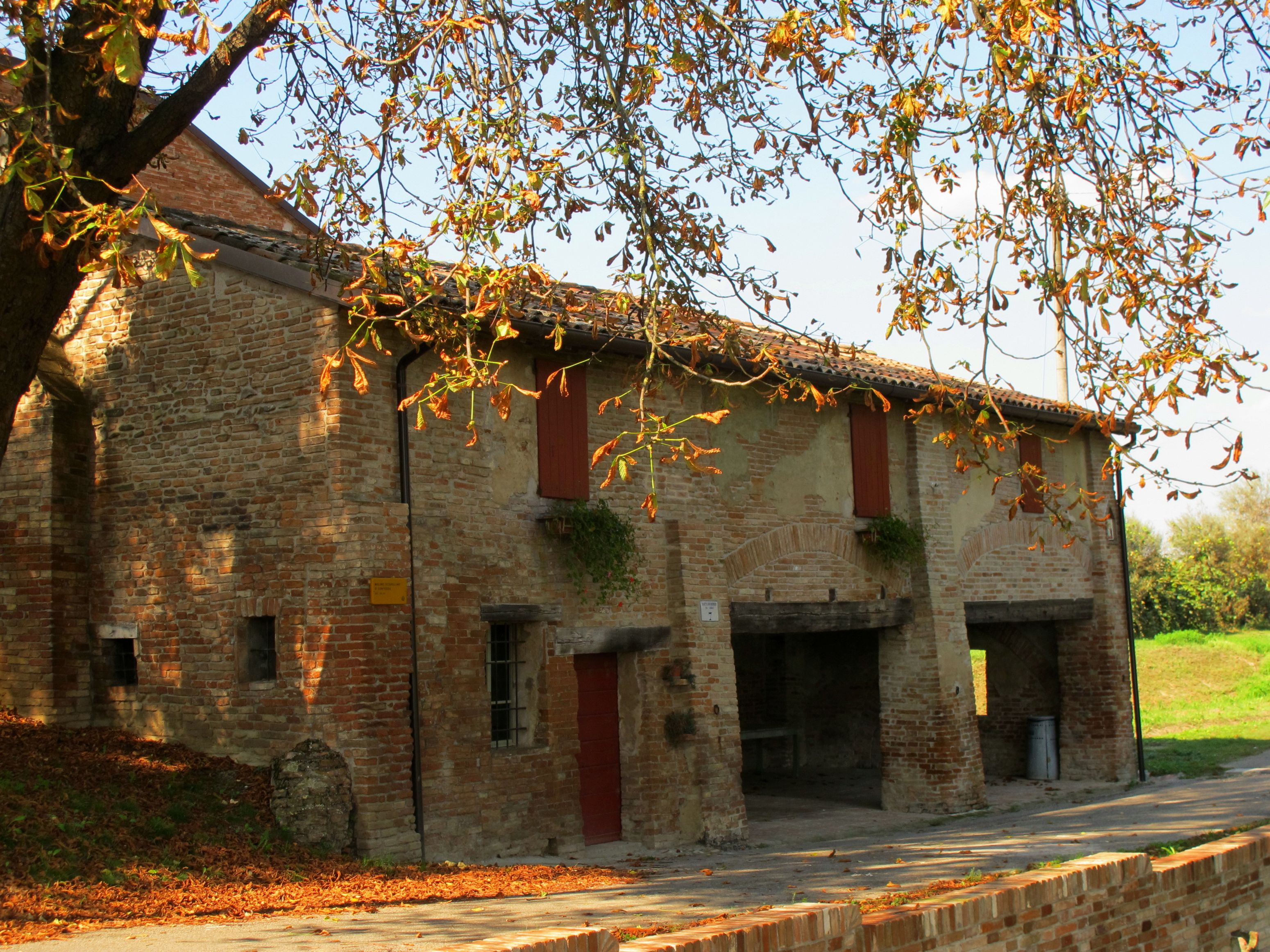 Mulino scodellino This is a photo of a monument which is part of cultural heritage of Italy.